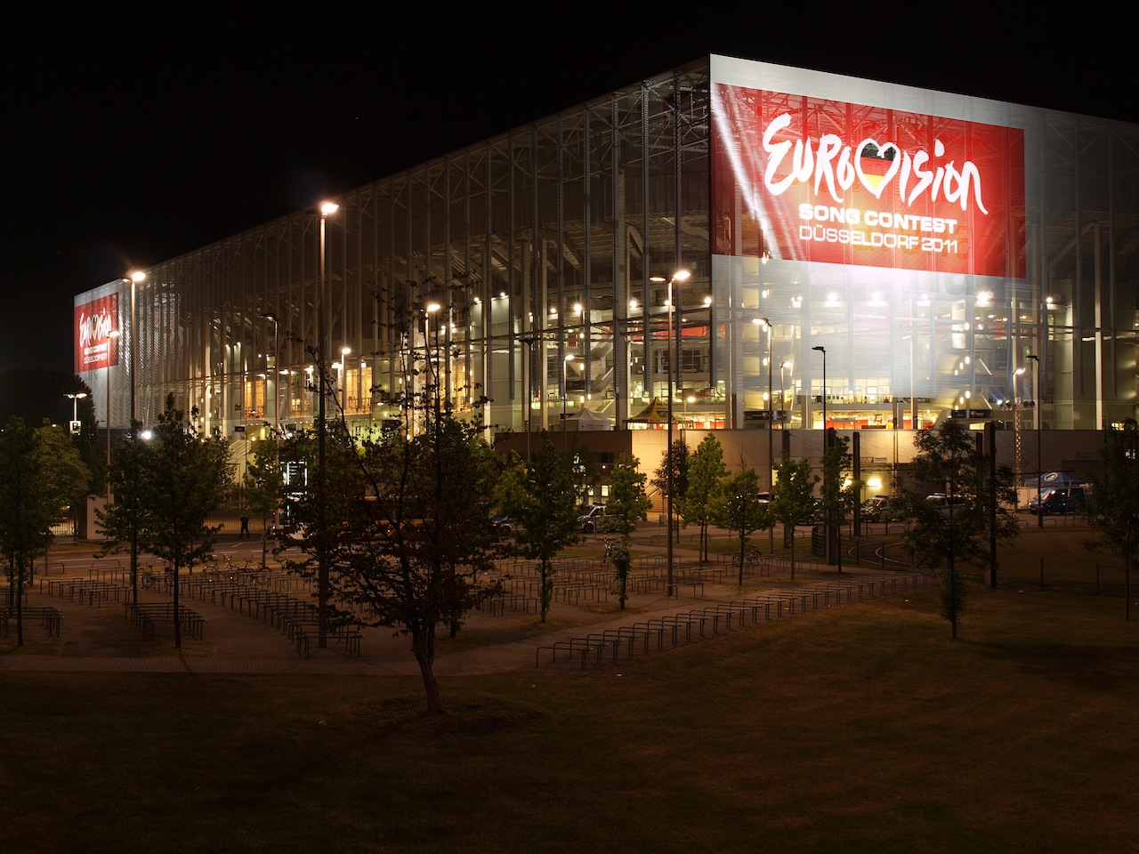 Eurovision-Arena bei Nacht